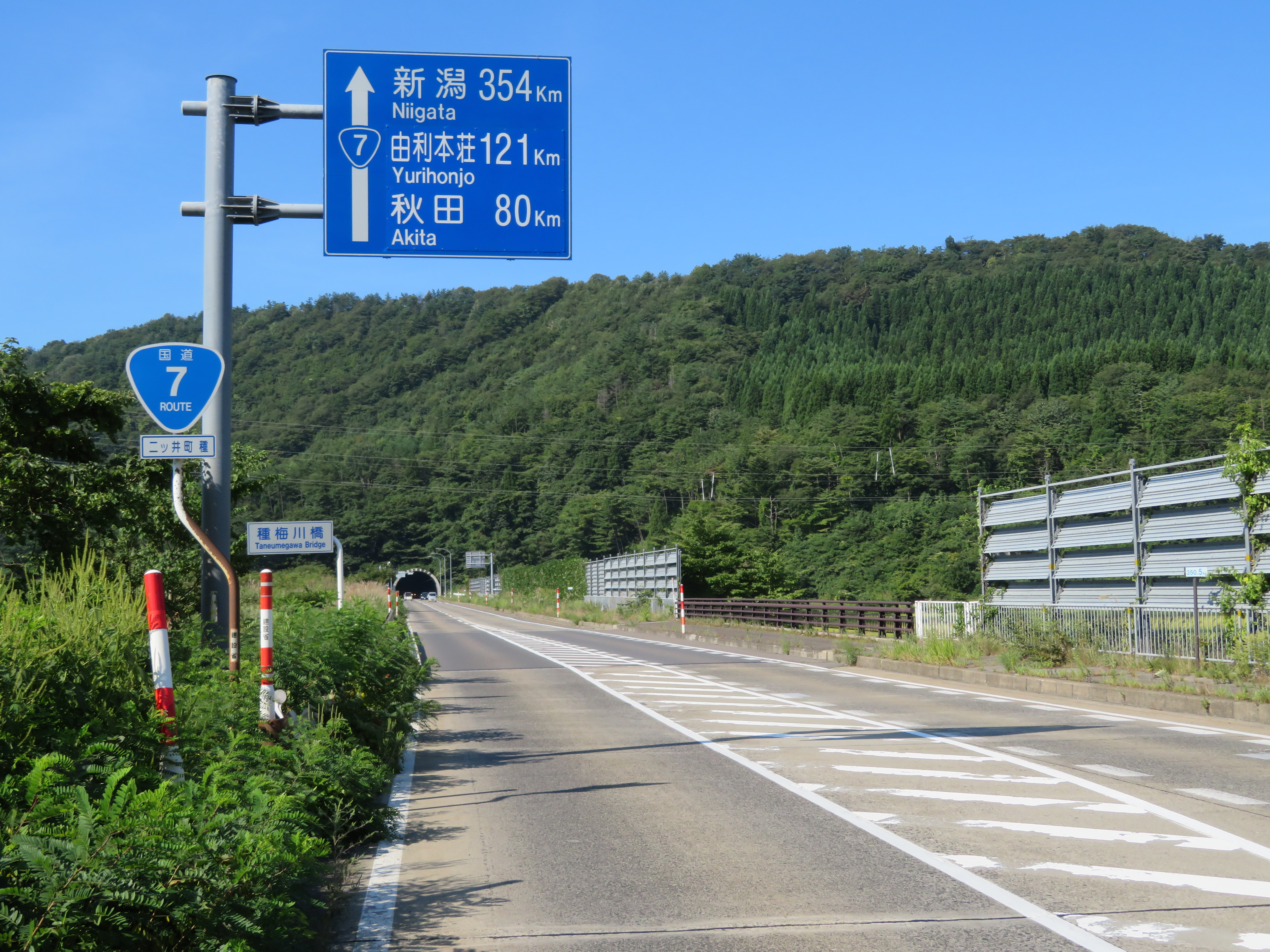 国道7号二ツ井バイパス 秋田県能代市二ツ井町種付近（秋田市方面を撮影）